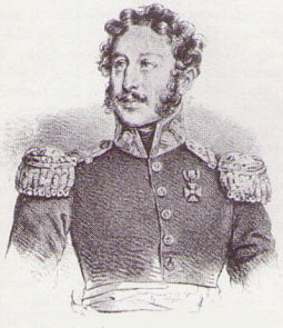 Franciszek Sznajde, 1831 bei seiner Durchreise in Straßburg